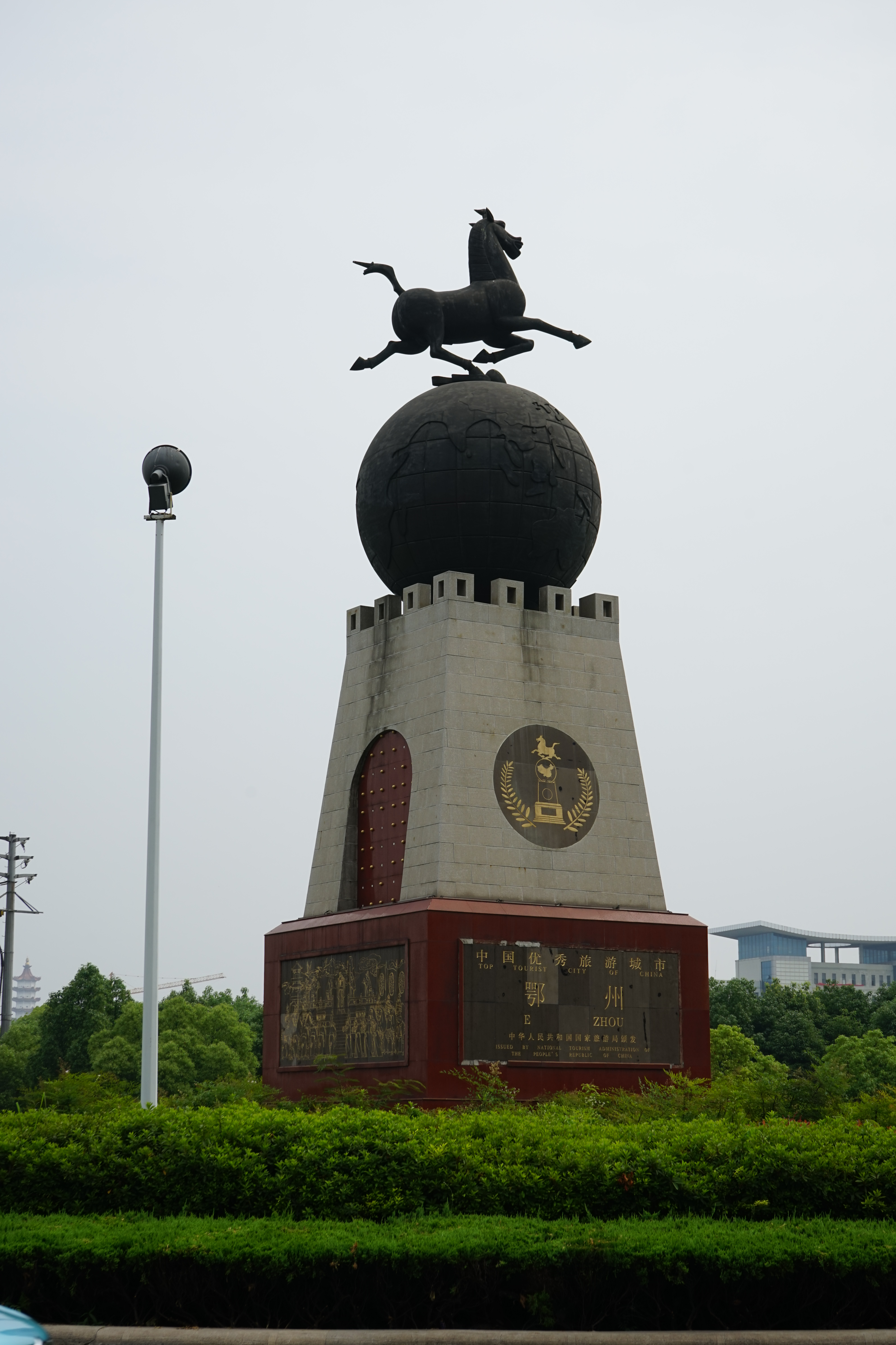 中国优秀旅游城市鄂州 雕塑